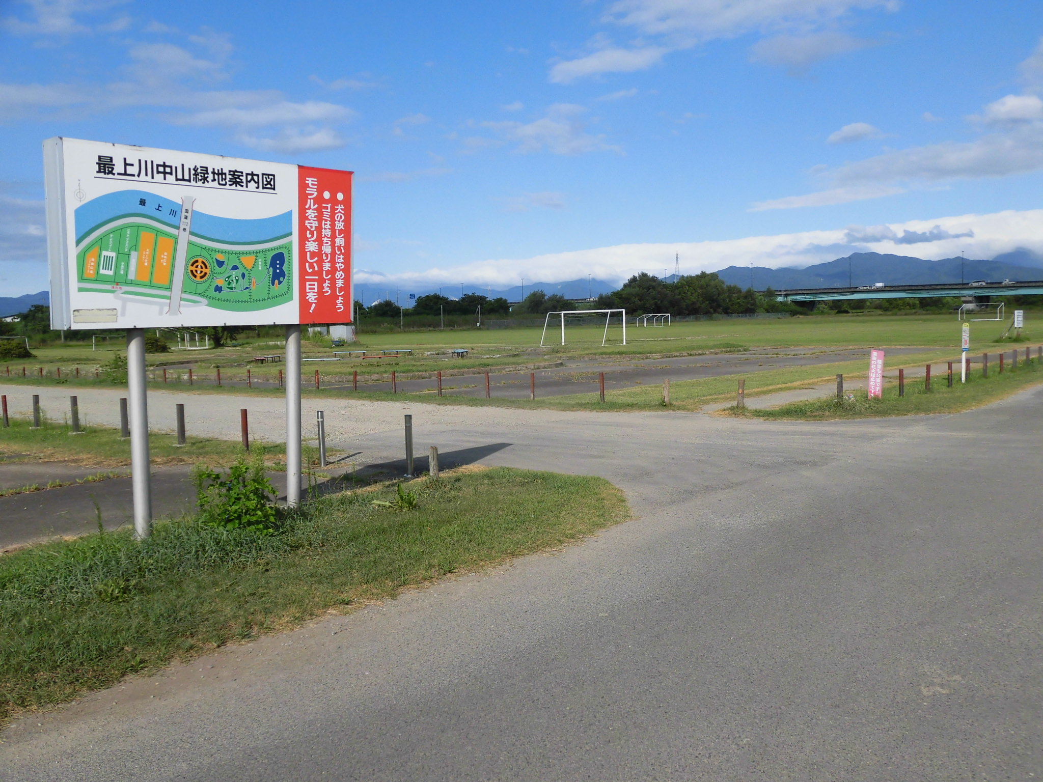 最上川中山緑地公園、運動広場。山形県東村山郡中山町長崎に所在。長崎大橋の西側。